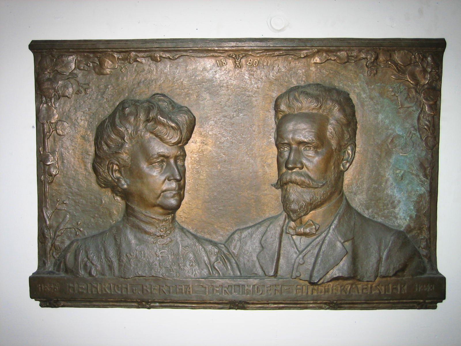 Gedenktafel im Goldbach-Zentrum, wo die Terlinden stand: Bertha Hintermeister und Heinrich Terlinden in ihrem Verlobungsjahr 1880